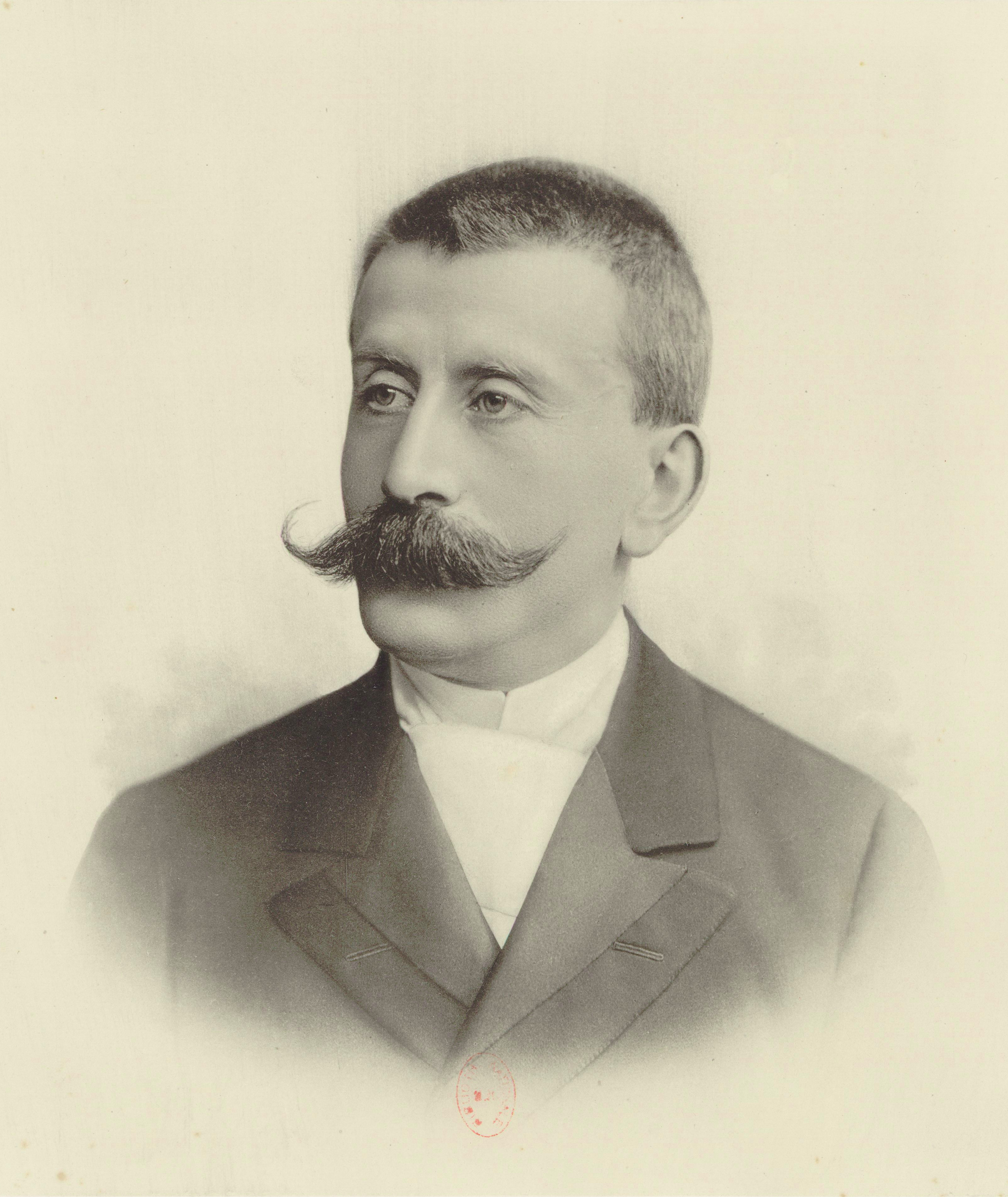 Portrait of Moritz Moszkowski